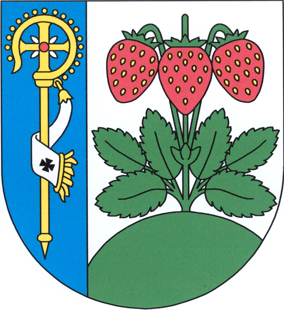 Krňany, znak